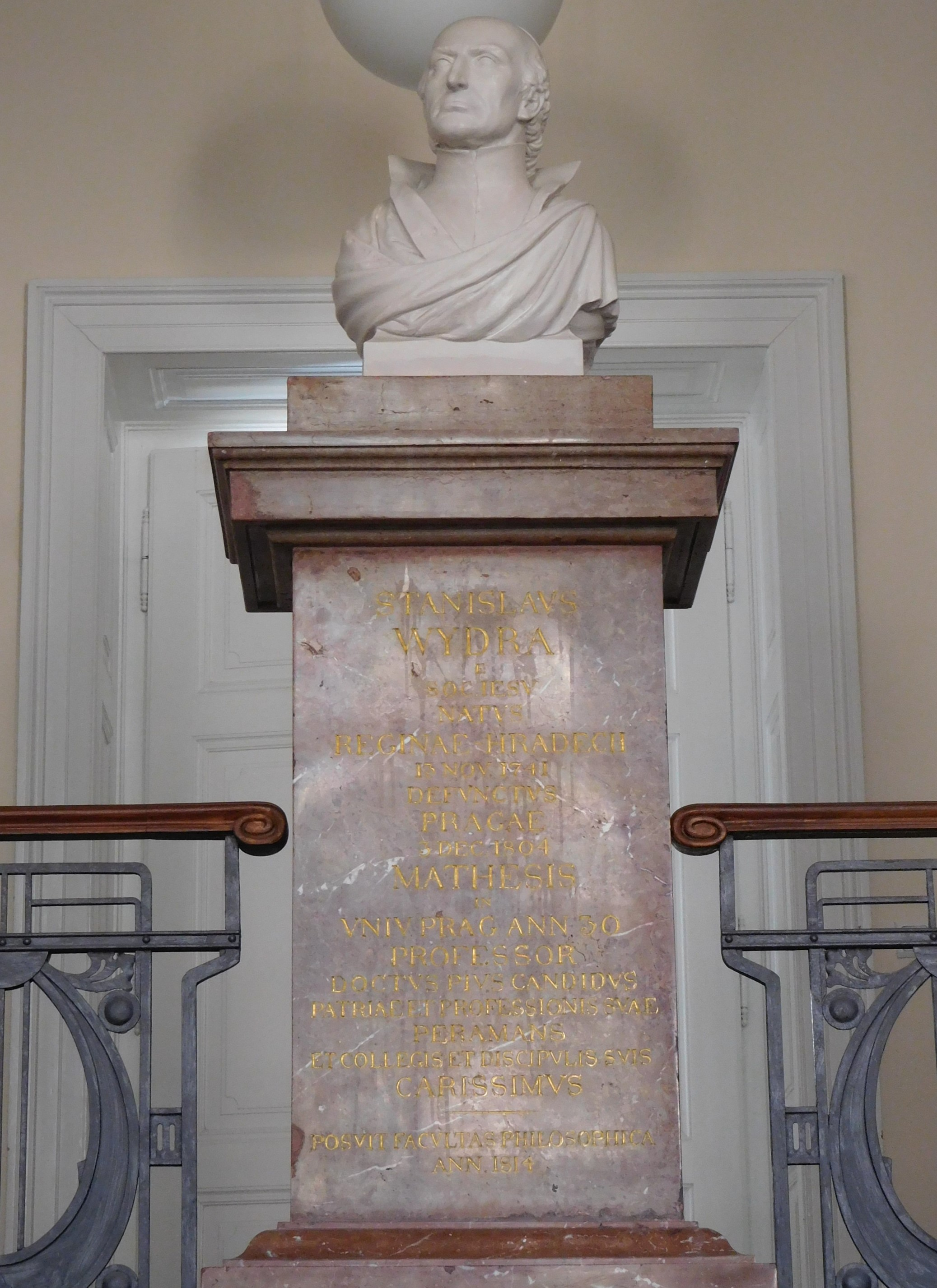 Praha - Nové Město, Ke Karlovu 3, pomník Stanislava Vydry